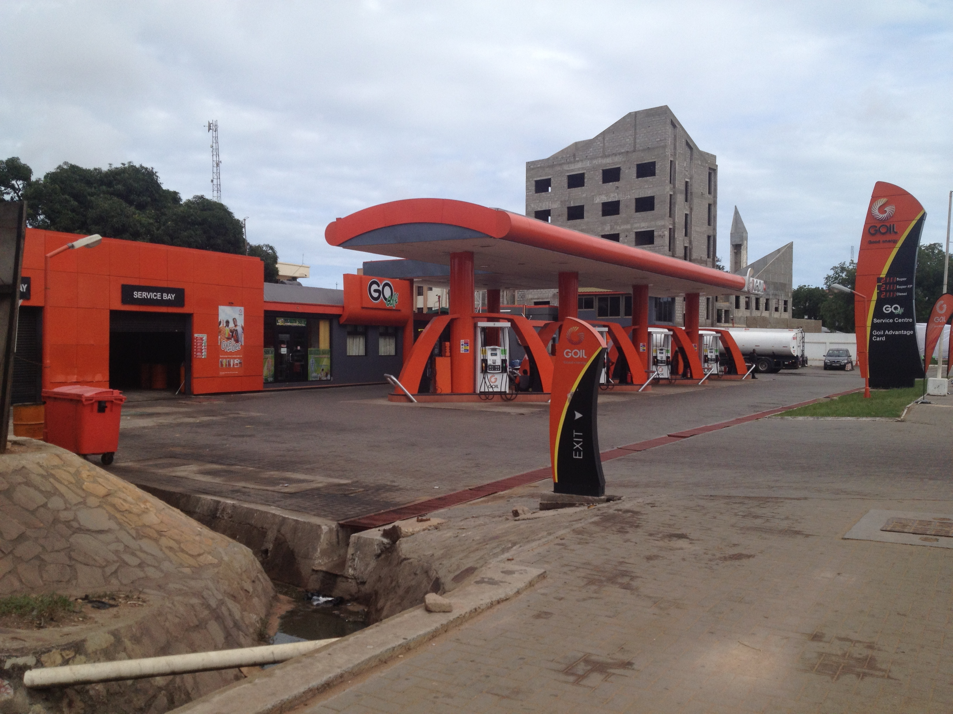 ガーナのガソリンスタンドGoil。